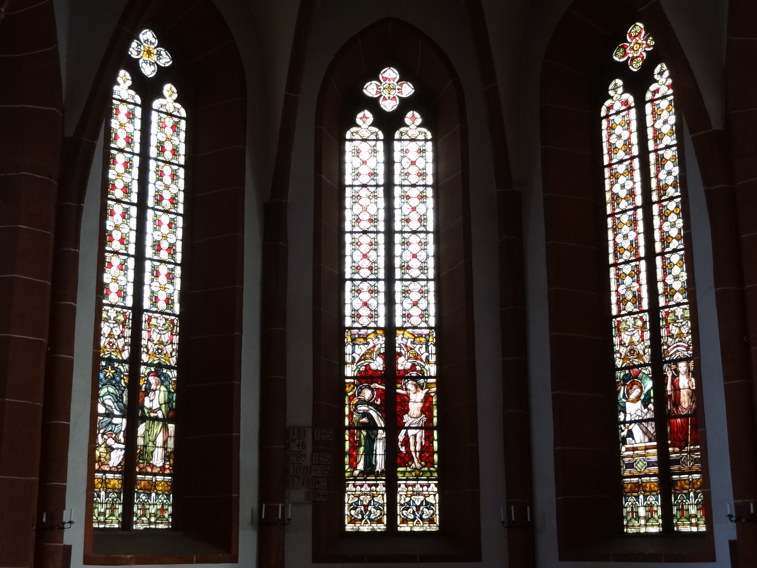 Markuskirche (Butzbach) Fenster